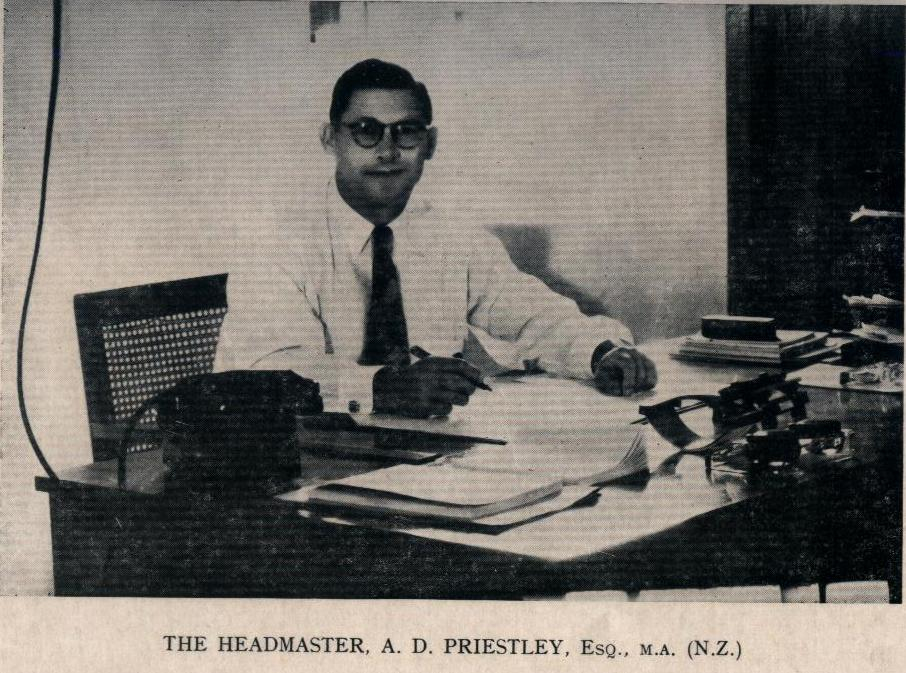 Sir Donald Priestly, Pengetua tahun 1950-an, Maxwell School